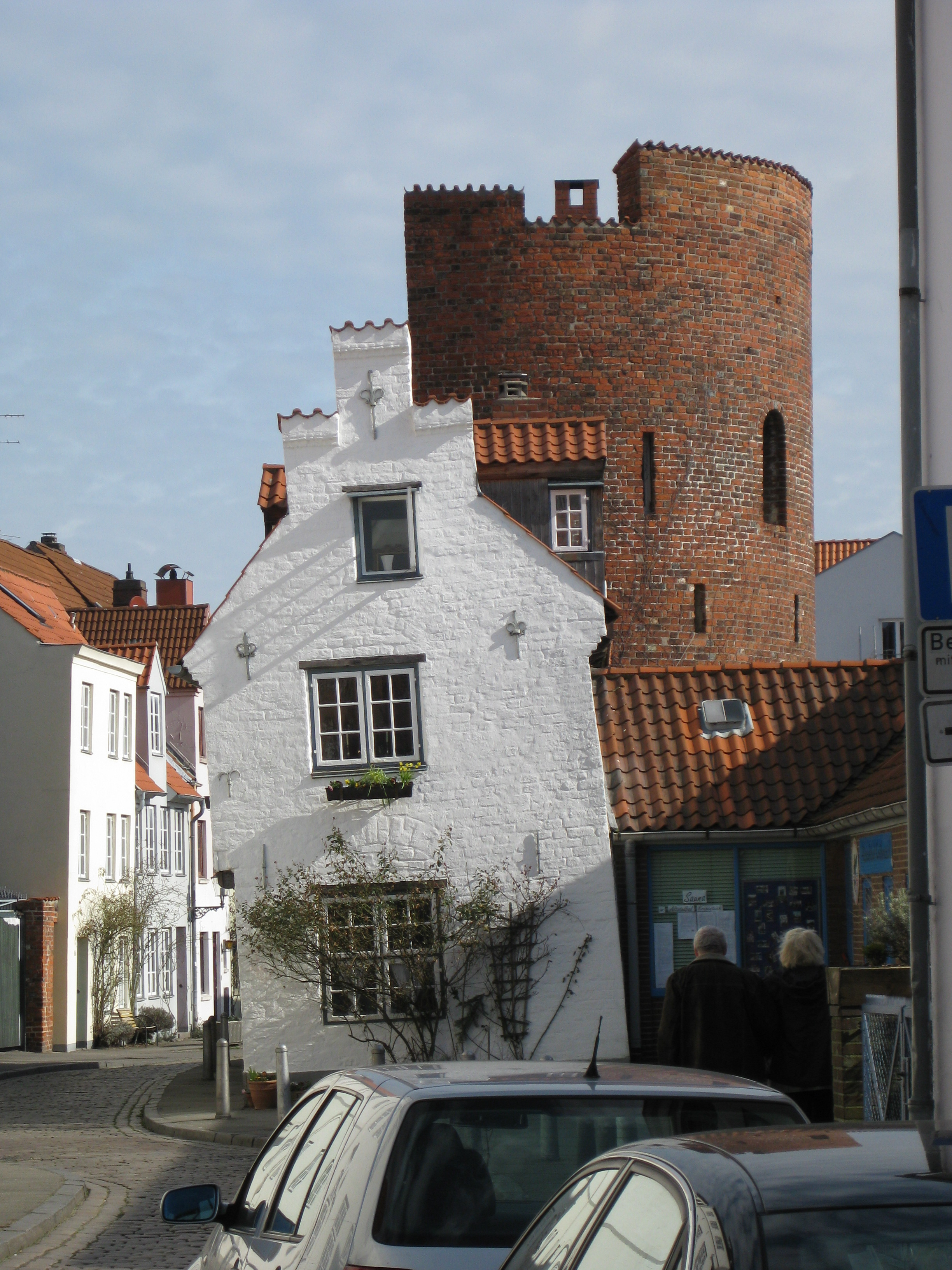 Fachwerkhaus aus der Renaissance in der Lübecker Altstadt, An der Mauer 51. Angebaut an die mittelalterliche Stadtmauer. Dahinter halbrunder backsteingotischer Befestigungsturm.